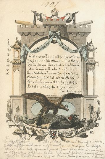 Deutscher Dank. Gedicht auf Postkarte zur Rückkehr der Soldaten aus China (Boxeraufstand)